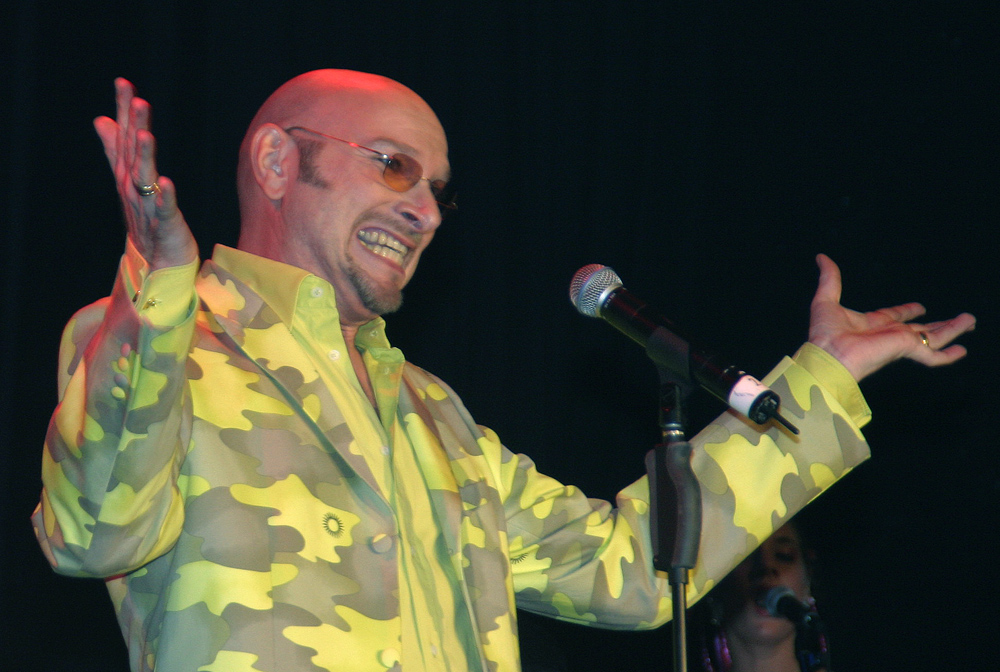 Ralph Morgenstern beim Benefiz-Konzert Cover me in Köln